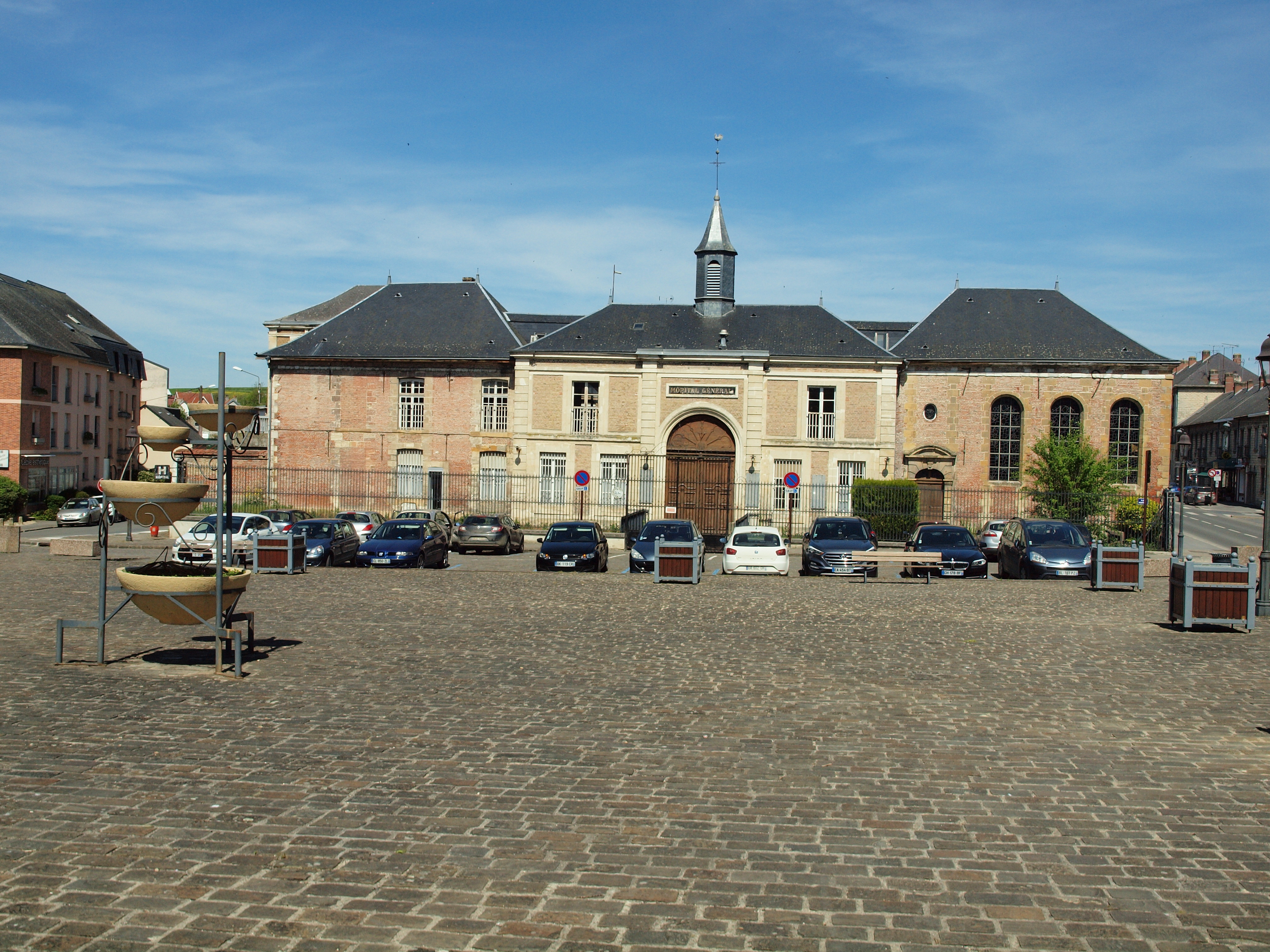 Hôpital de Rethel (Ardennes, France)